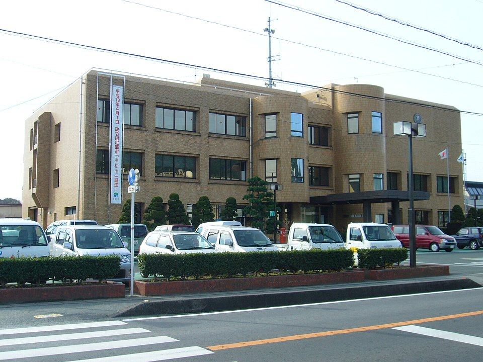 浜松市北区役所（撮影当時は浜松市細江総合事務所） 細江町役場→浜松市細江総合事務所→浜松市北区役所 と変遷してきた